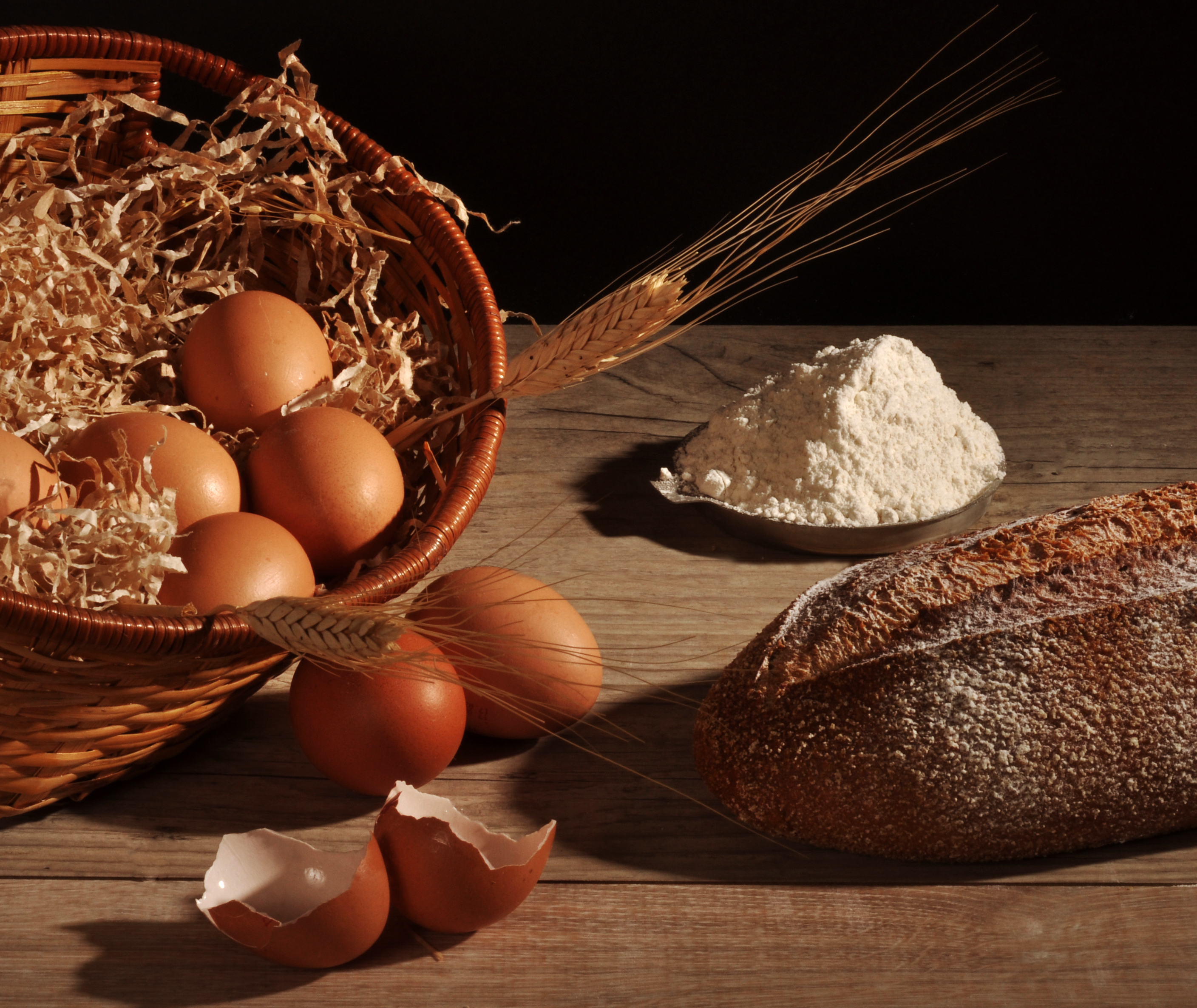 לחם סטודיו תיכון רוטברג